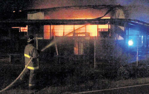 Incendio en Escuela Secundaria Angel Maria Herrera